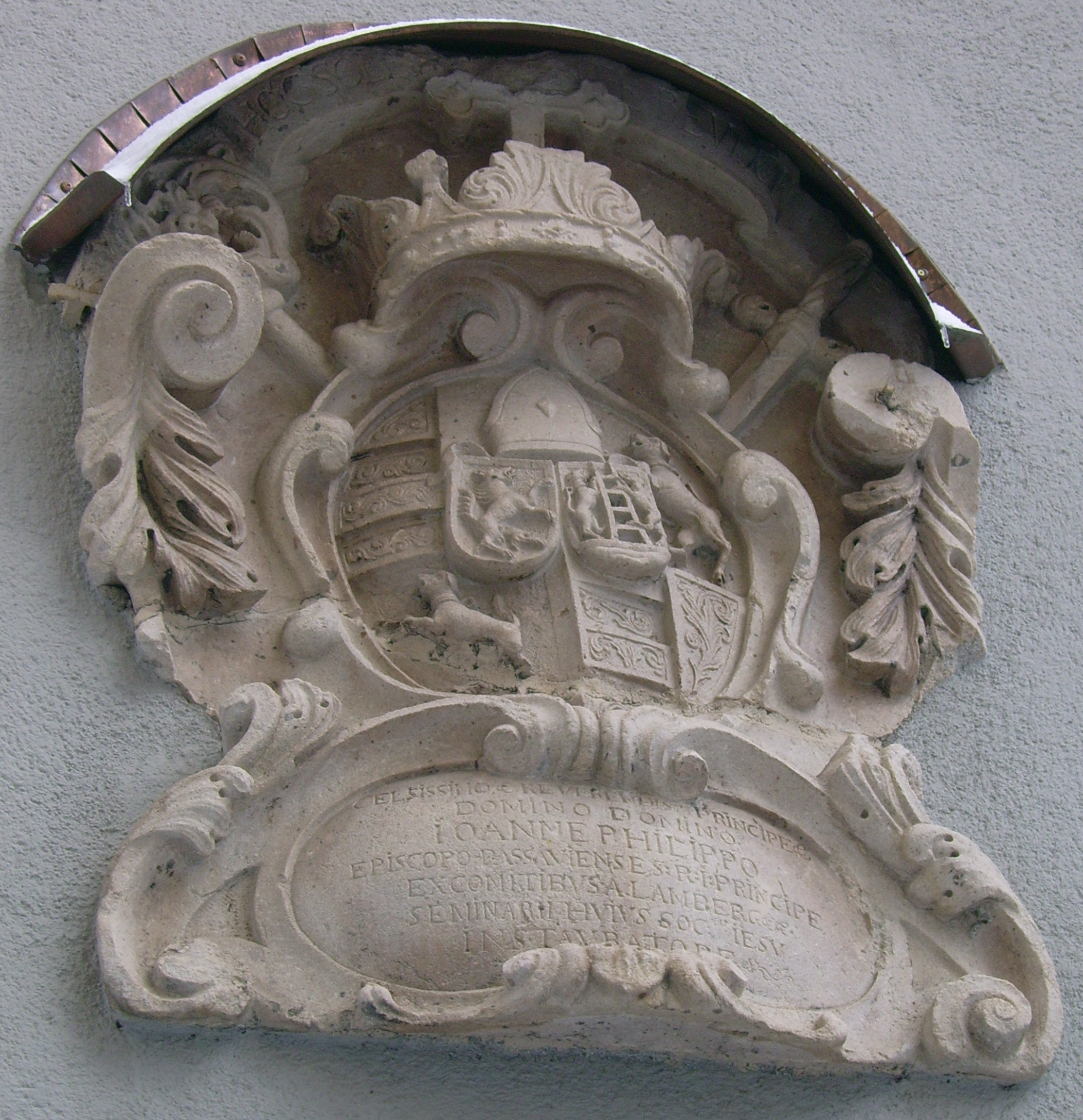 Rhaetenhaus